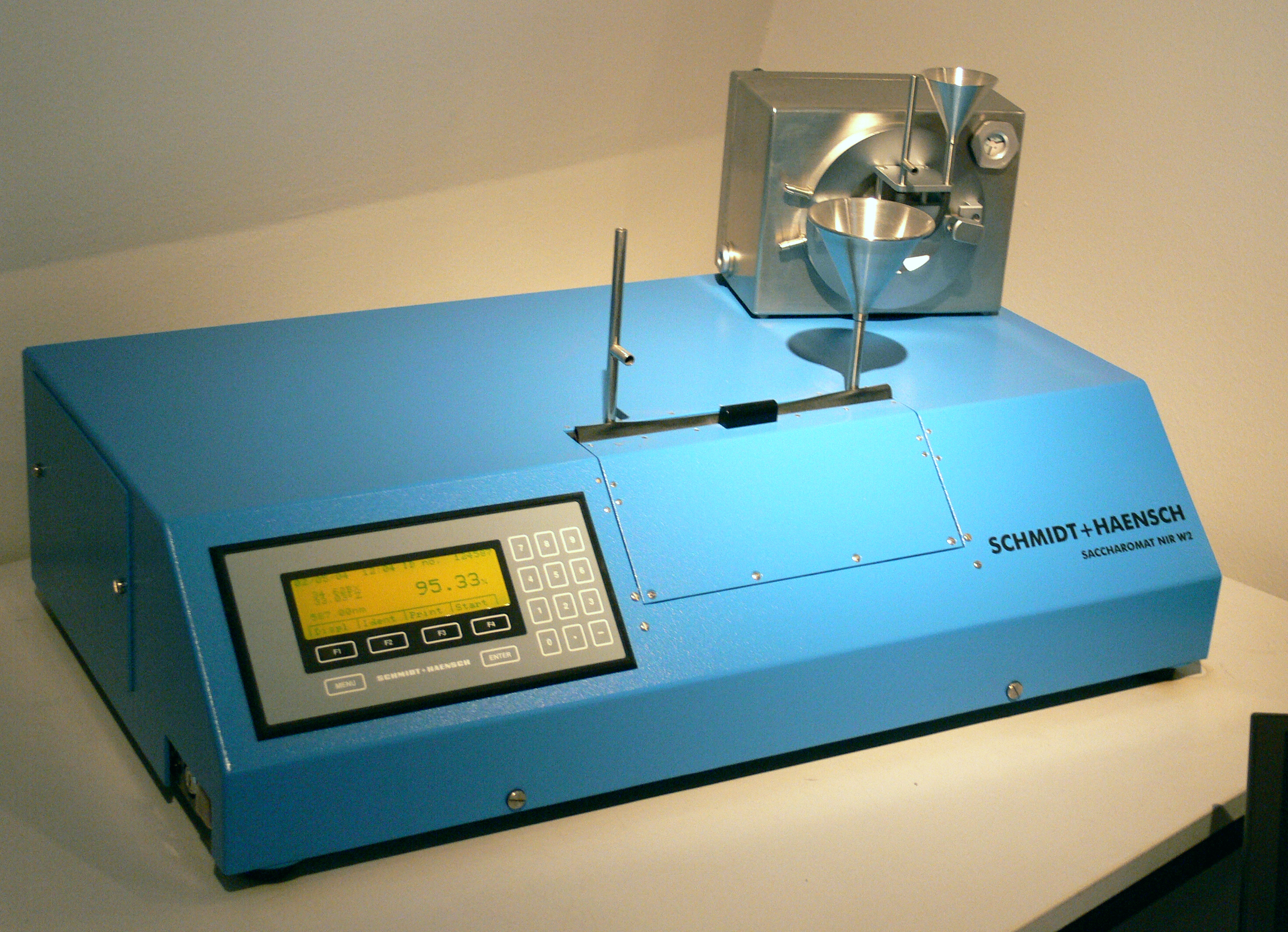 Digitaler Saccharimeter für die Zuckeranalytik (Modell Schmidt + Haensch, 2004; ausgestellt nur das Gehäuse)